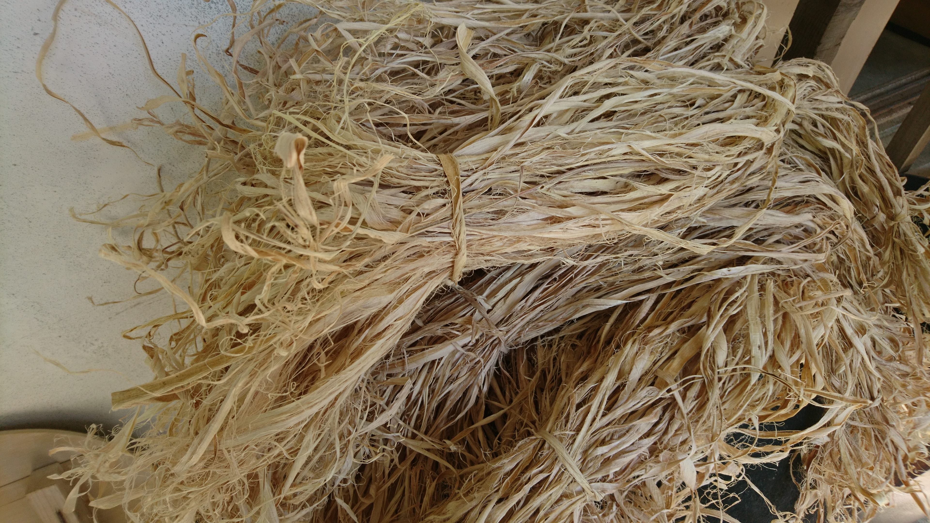 藤織りの原材料である藤蔓の中皮部分。丹後ではアラソという。